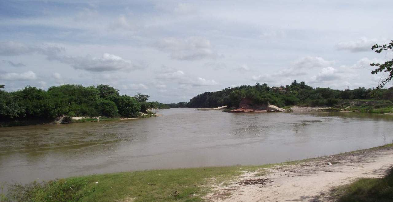 Rio Pindaré, interior do Maranhão, Brasil.